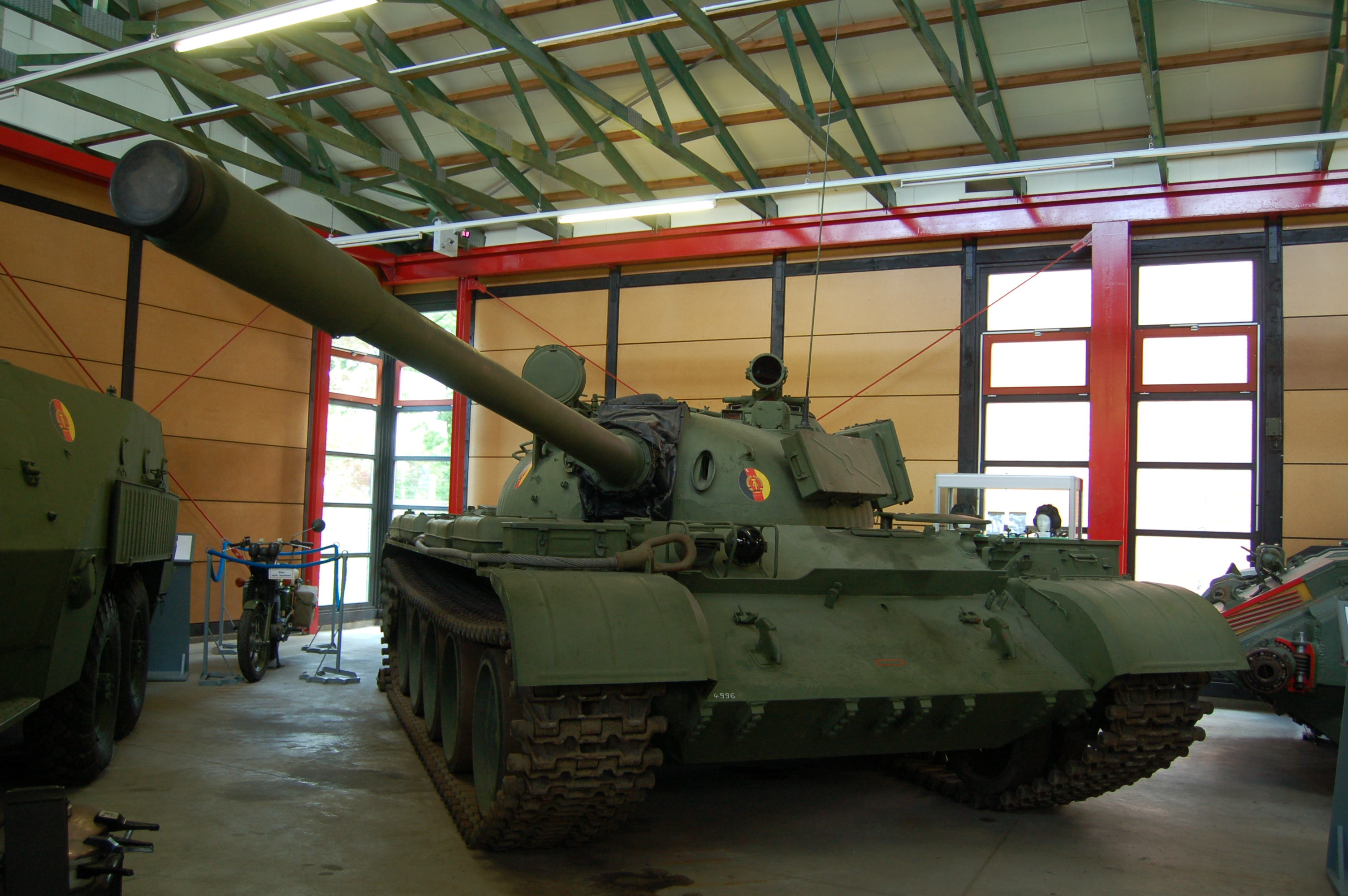 Mittlerer Kampfpanzer T 54 AM (NVA)*Besatzung: 4 Soldaten Gewicht: 36,0 Tonnen Motorleistung: 382 kW (520 PS) Bewaffnung: 1 BK 100 mm D-10-TG, 1 Bug u. Turm MG DTM, Kaliber: 7,62 x 54 sowie 1 Fla-MG 12,7 mm DSCK-M Baujahr: 1950 - 1977 Stückzahl: 698 (NVA)